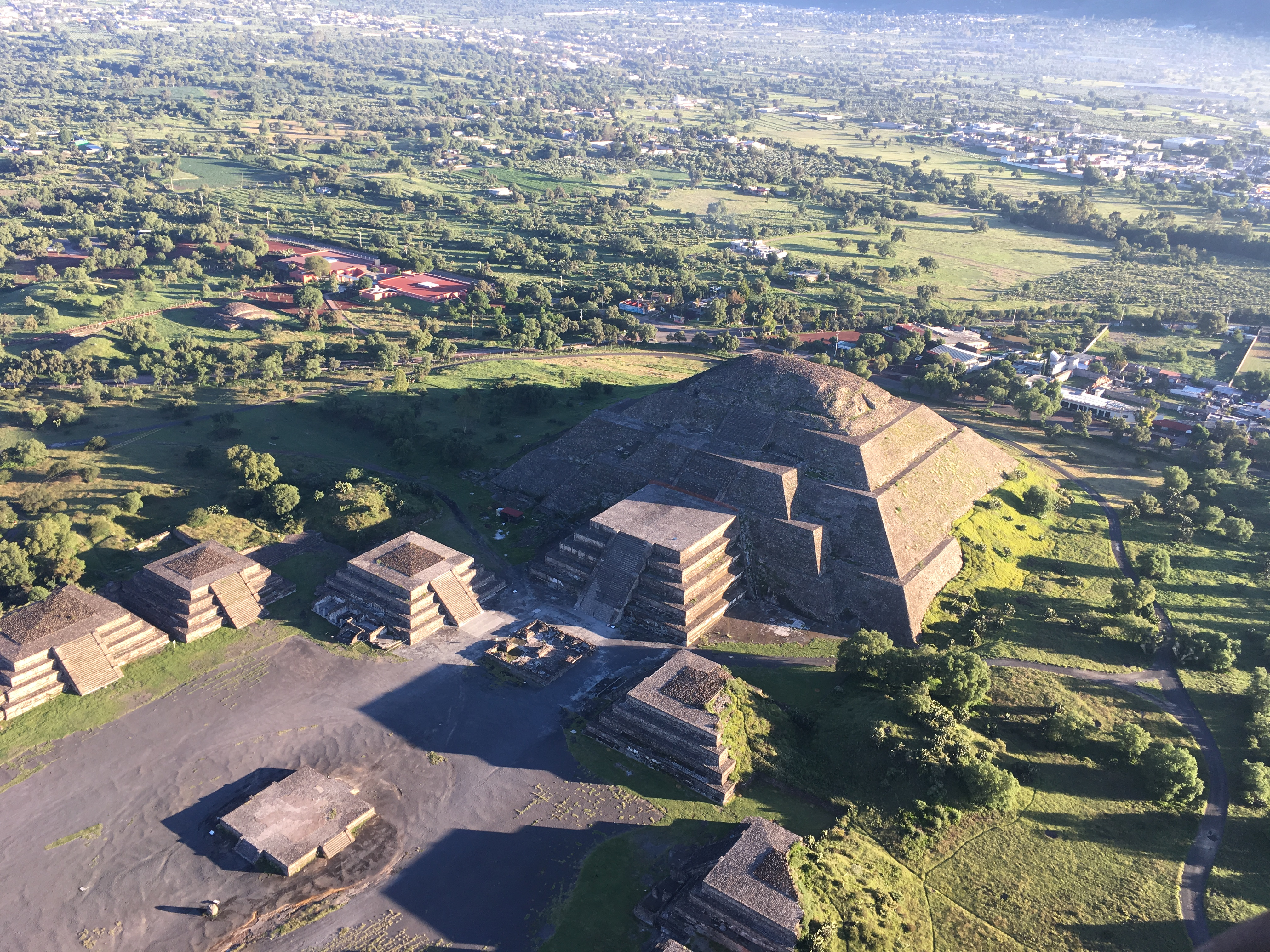 Pirámide del Sol, Teothihuacán, México